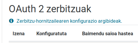 Moodle OAuth 2.0